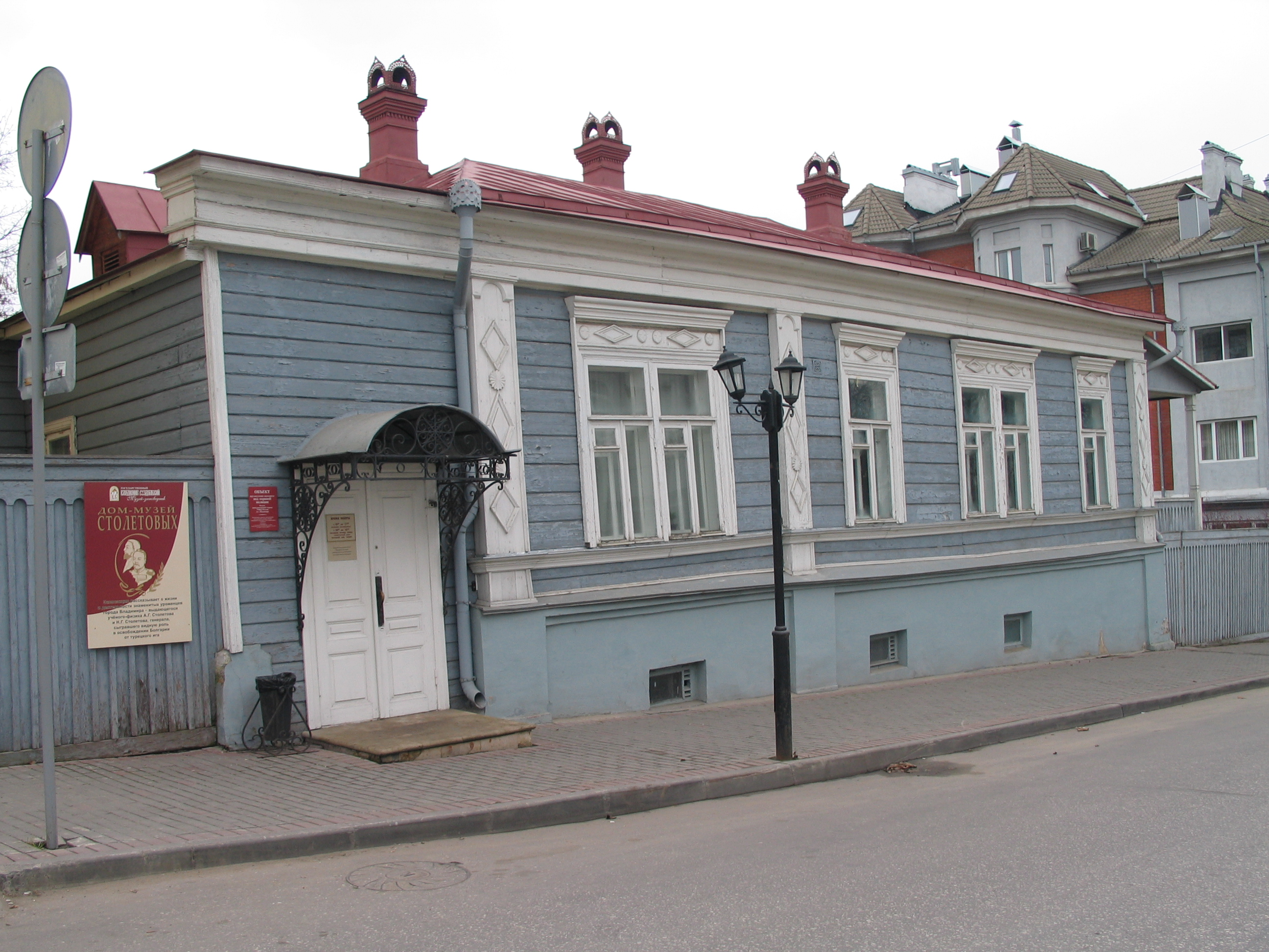 Дом-музей братьев Столетовых во Владимире